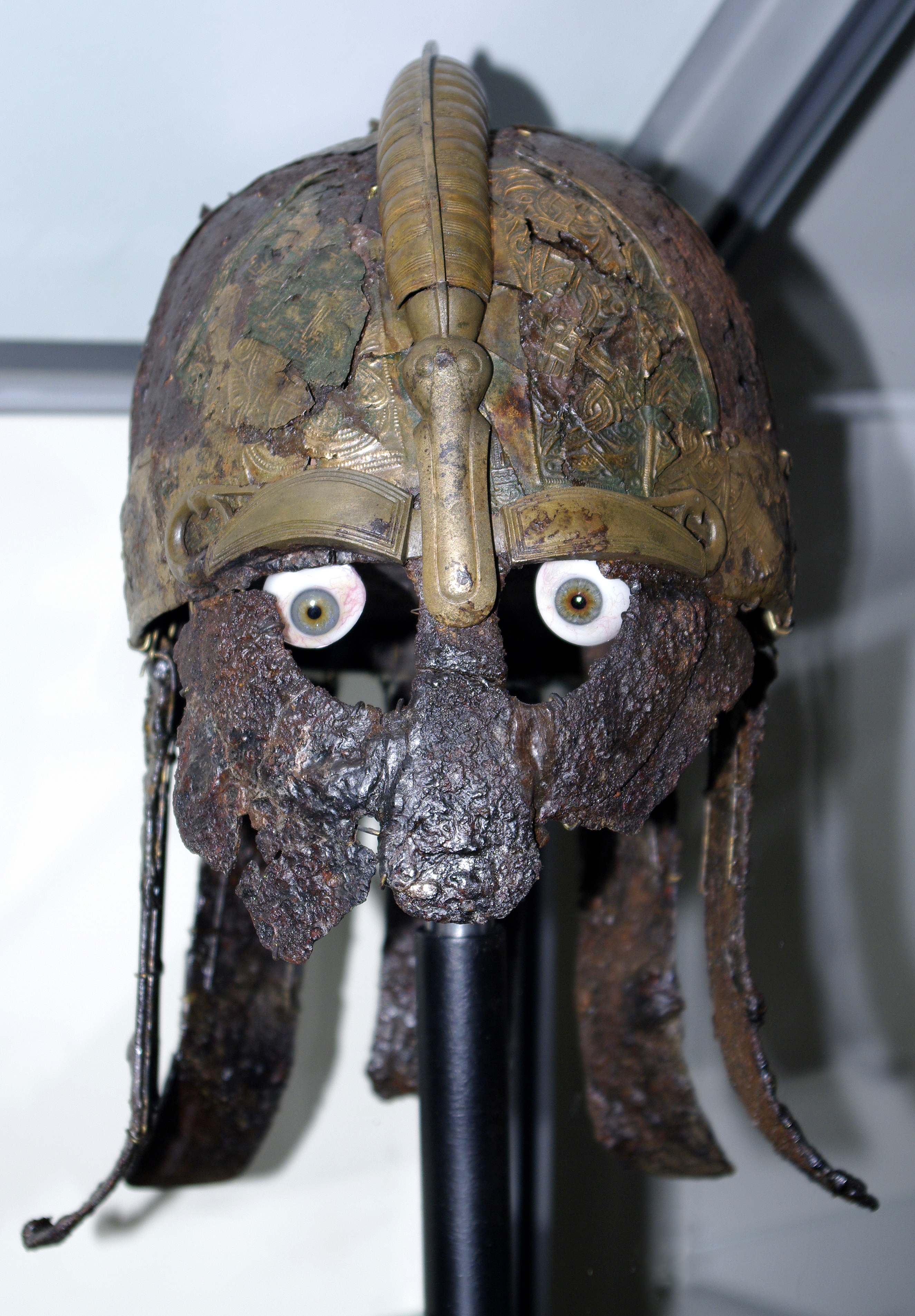 Hjälm från Valsgärde gravfält Uppsala 209:1 på museet Gustavianum i Uppsala.